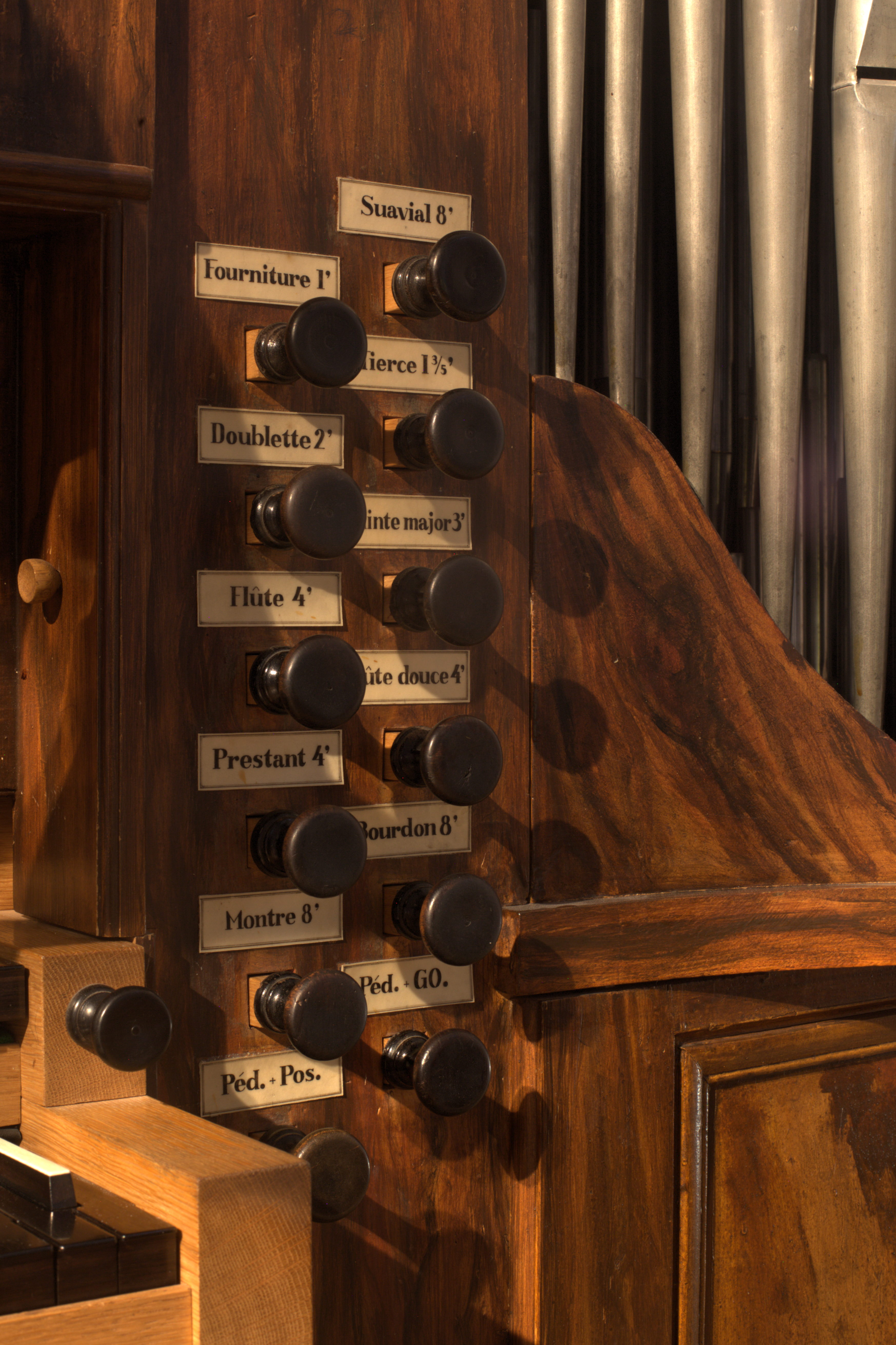 Église de Saint-Etienne, Moudon